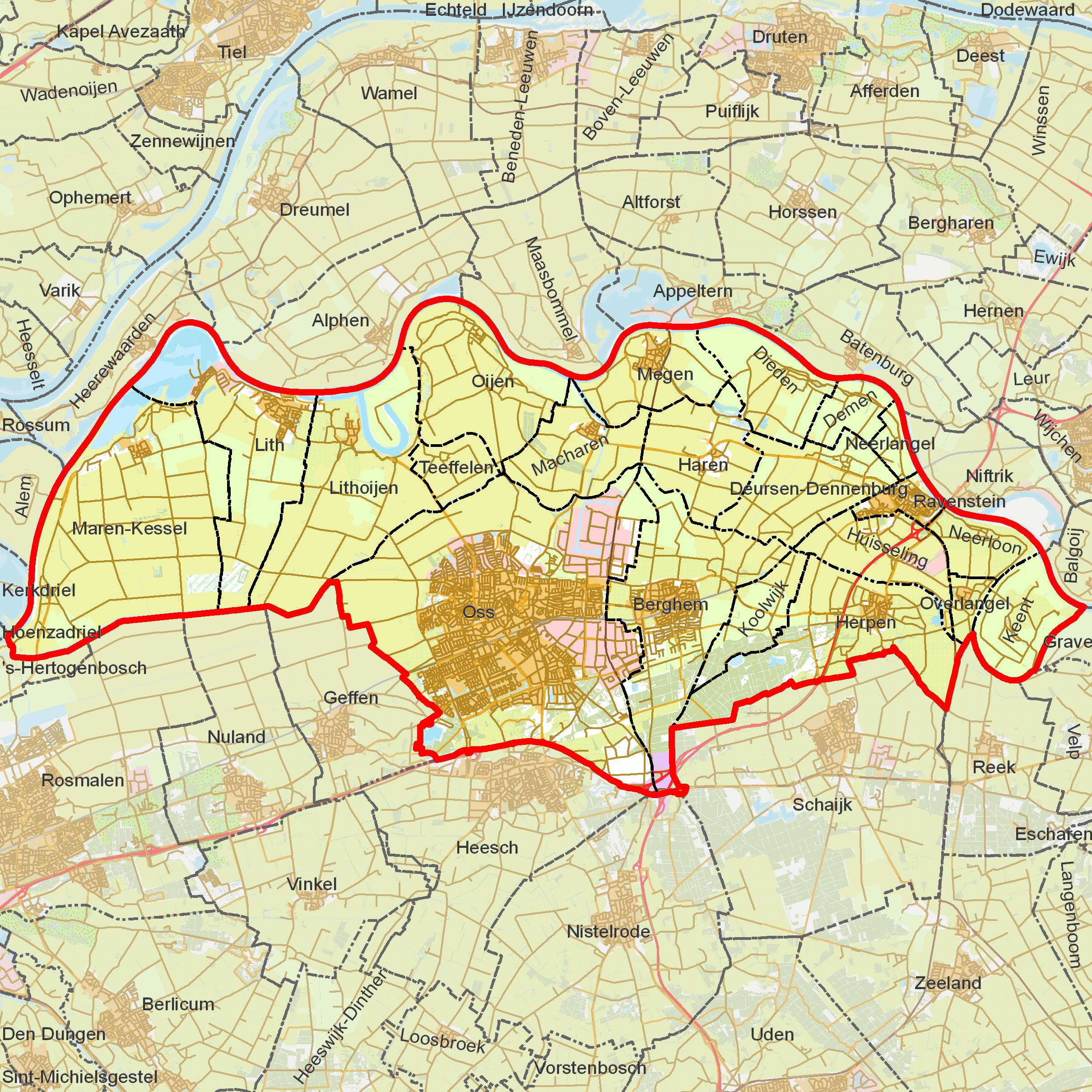 BAG woonplaatsen - Gemeente Oss.png